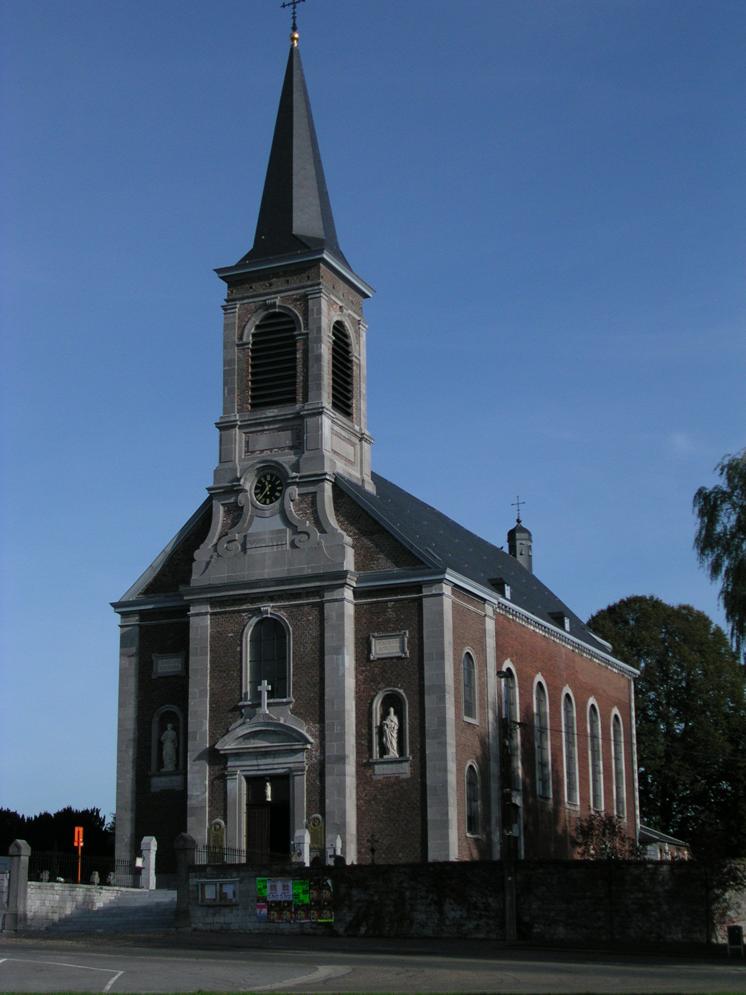 Montzen: rk. Pfarrkirche Saint Etienne nach Plänen von Josef Moretti 1780f im barockstil errichtet